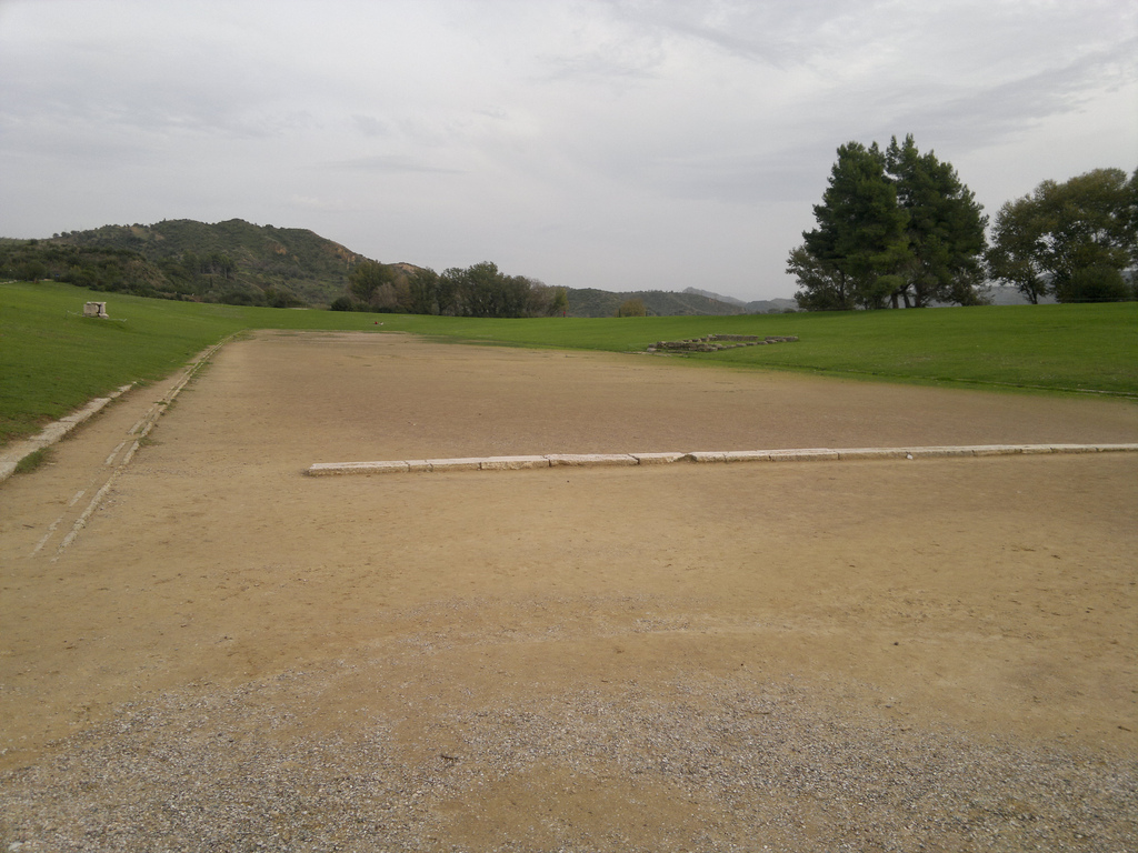 Ancient Olympia, Greece. Photo taken with Nokia N8 (12 Megapixel). Αρχαία Ολυμπία. Φωτογραφία που τράβηξα με το Nokia N8.